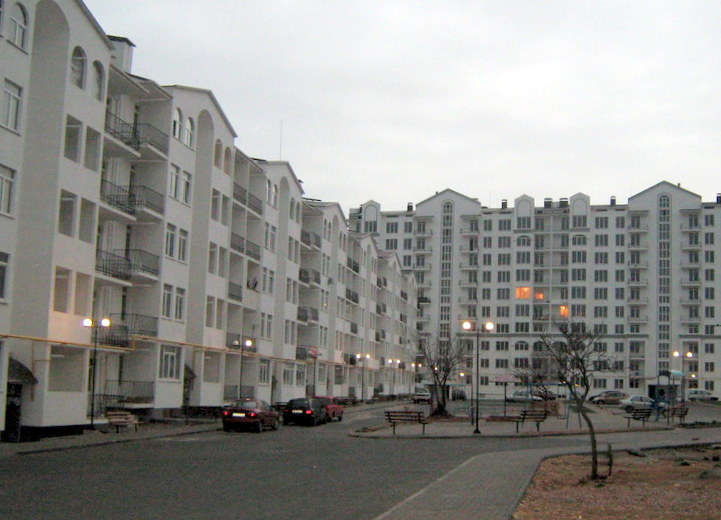 Мікрорайон Омега-Сіті. (Челнокова12/2 і 12/6)